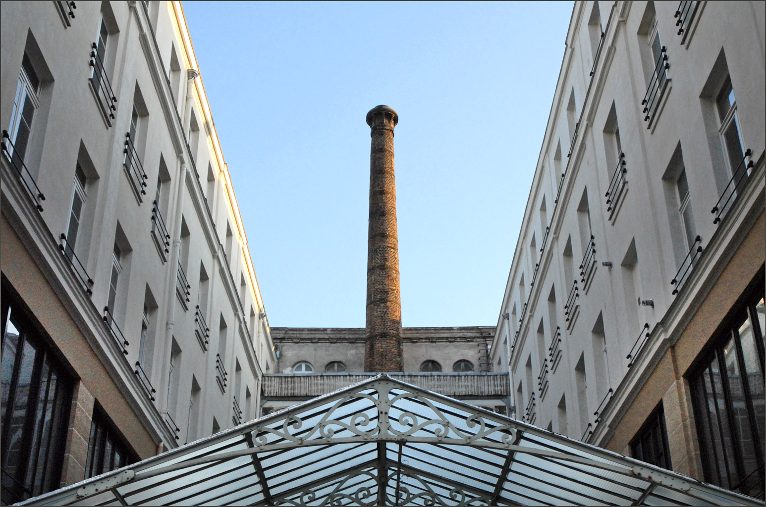 Le passage de l'Innovation à Paris, 74 rue Faubourg Saint-Antoine